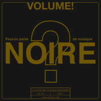 Couverture du n°8-1 de Volume ! La revue des musiques populaires - dossier "Peut-on parler de musique noire ?"